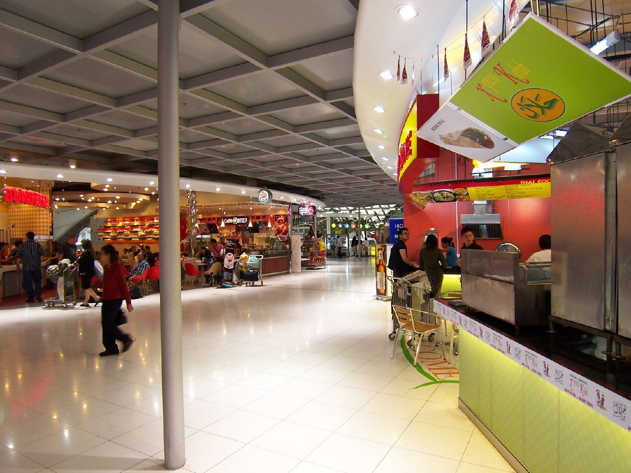 Suvarnabhumi Airport